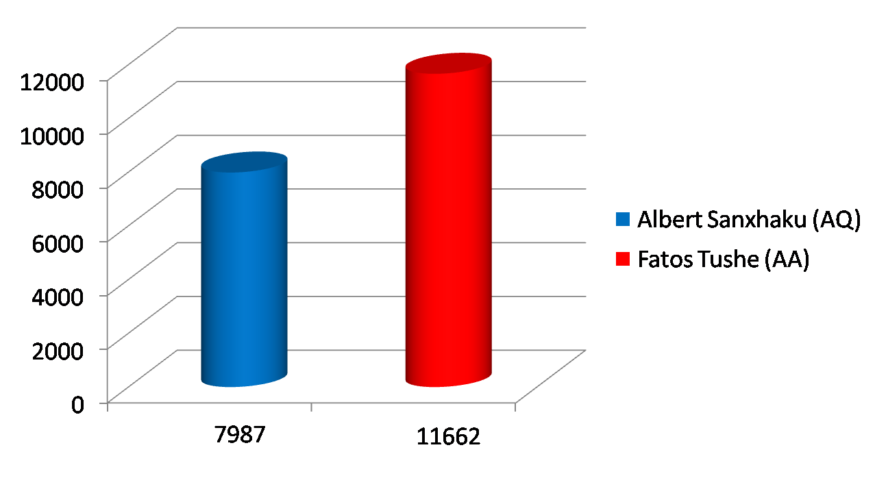 Rezultati në Lushnje